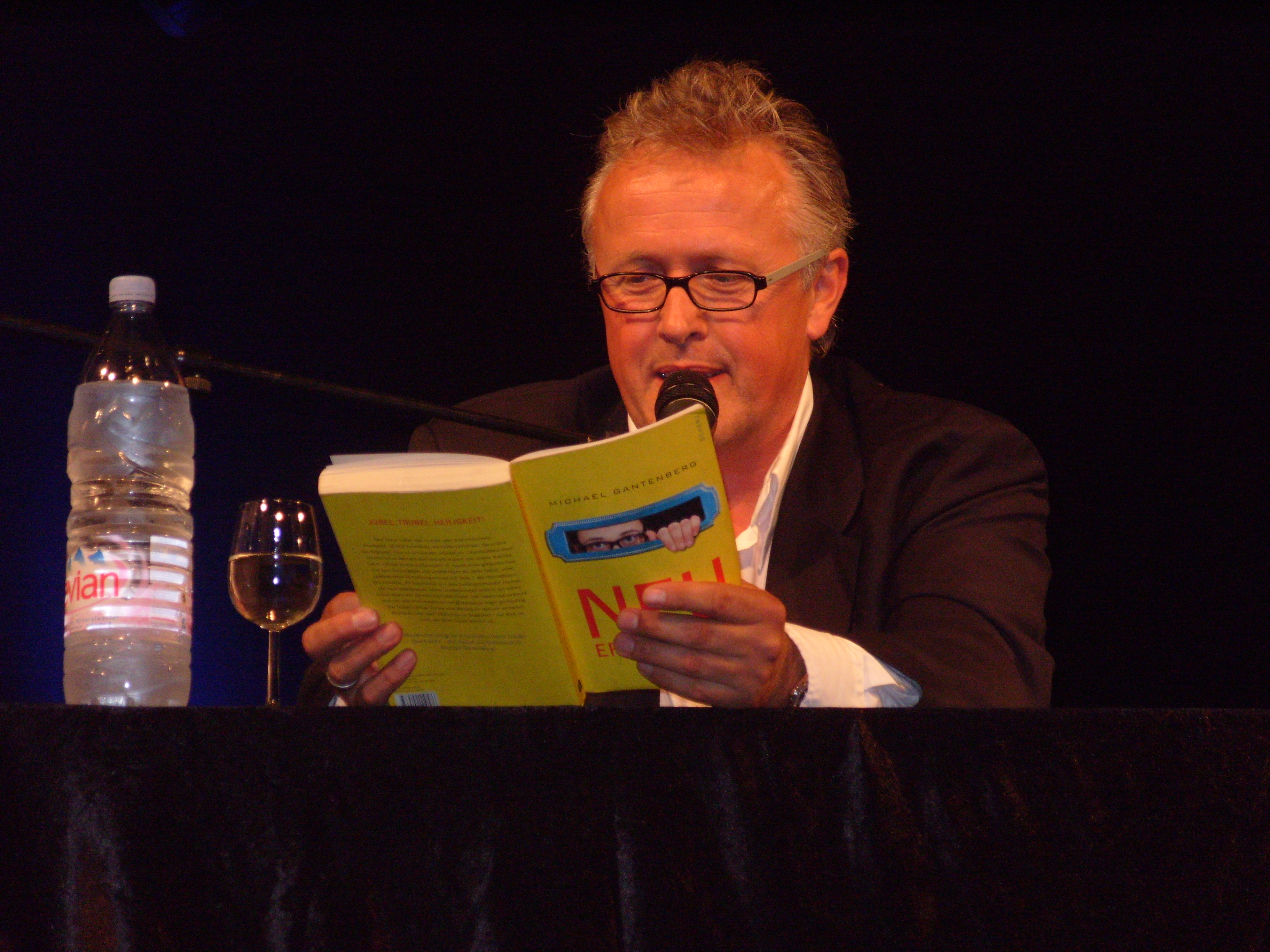 Michael Gantenberg liest aus seinem Debütroman "Neu-Erscheinung"